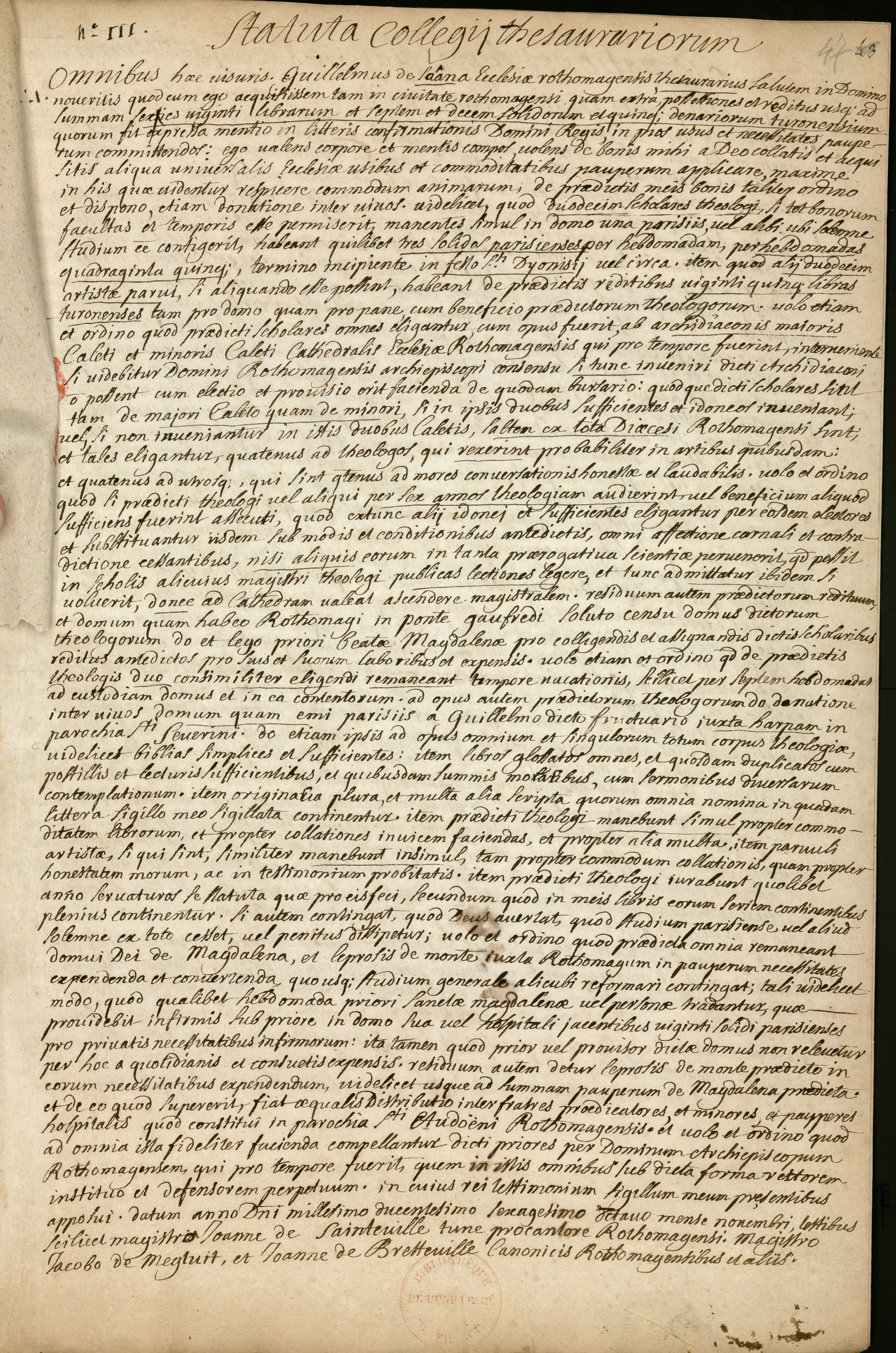 Manuscrit en latin, dans un registre de 738 feuillets consacré aux fondations et statuts des collèges.